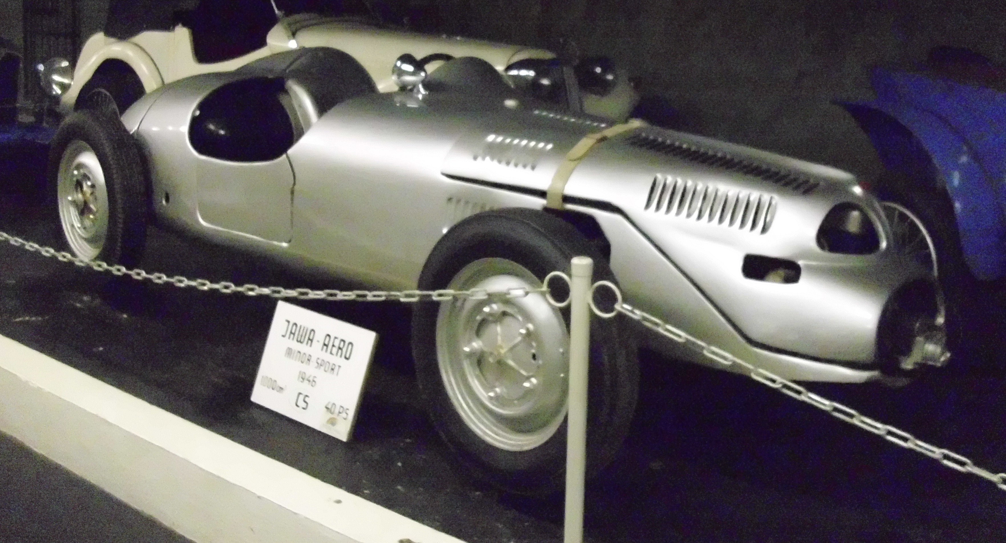 Aero Minor 1946 im Automobil-Museum Aspang